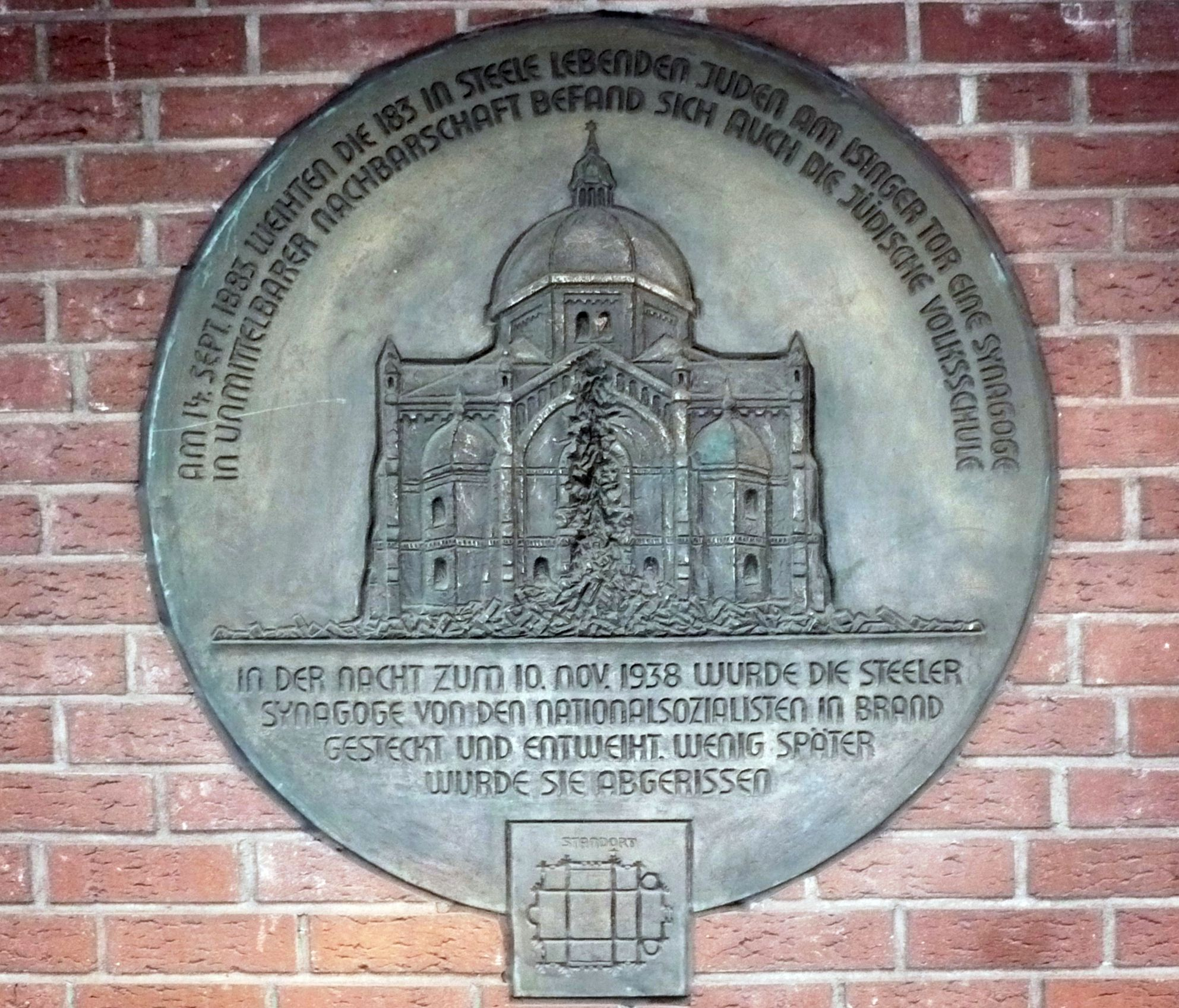 Gedenktafel der Alten Synagoge in Essen-Steele